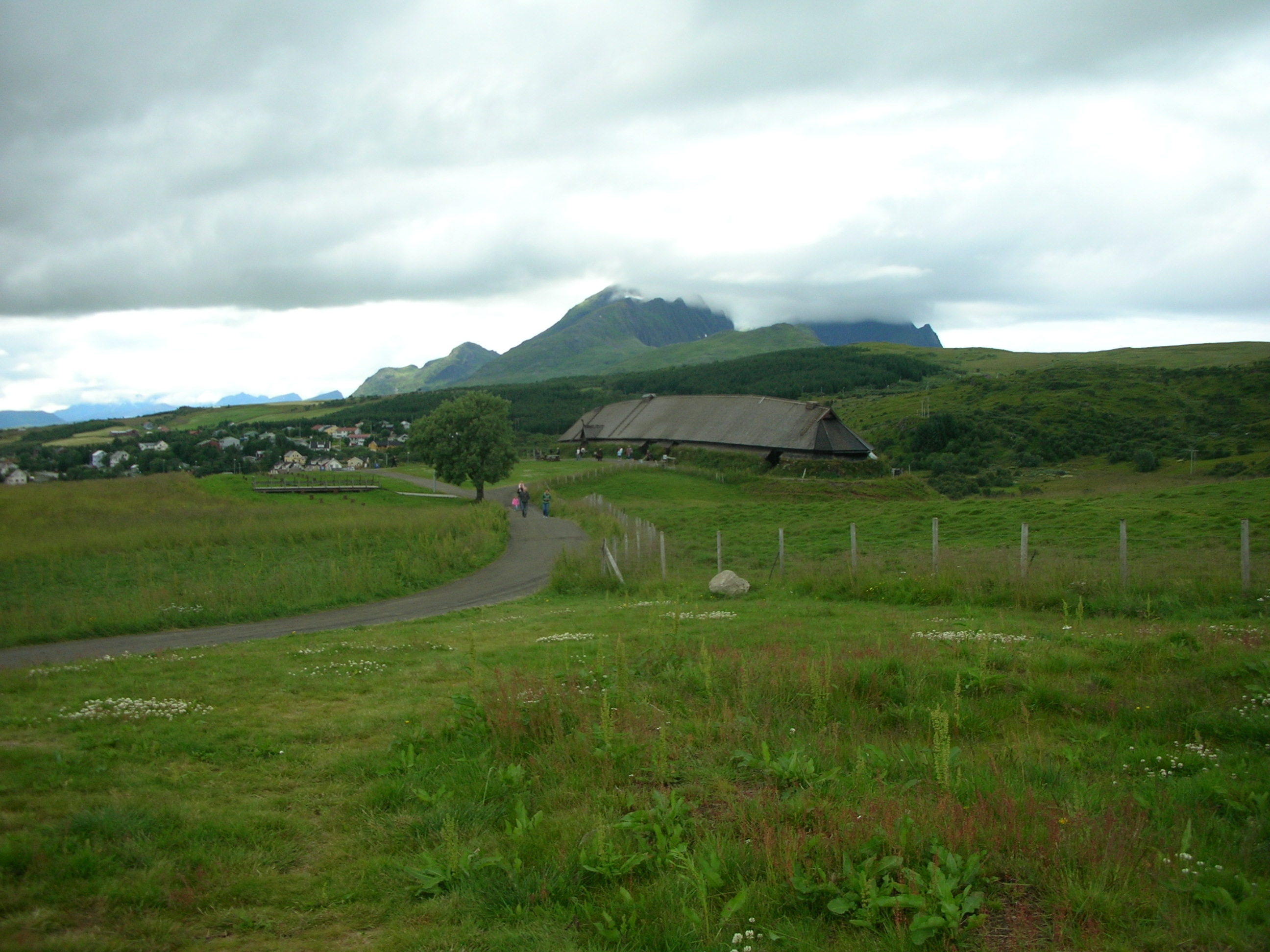 Borg på Vestvågøya